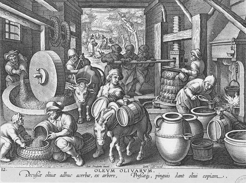 una scena di un frantoio con le varie fasi della lavorazione dell’olio di oliva, dalla frangitura, alla spremitura, alla chiarificazione, fino alla conservazione in orci di terracotta. Commissionata a Giovanni Stradano (Jan Van Der Straet) da Luigi Alamanni (1558-1603), nobile ed erudito fiorentino, tra il 1587 e il 1589, questa tavola è incisa e pubblicata da Philip Galle nella raccolta « Nova Reperta ».